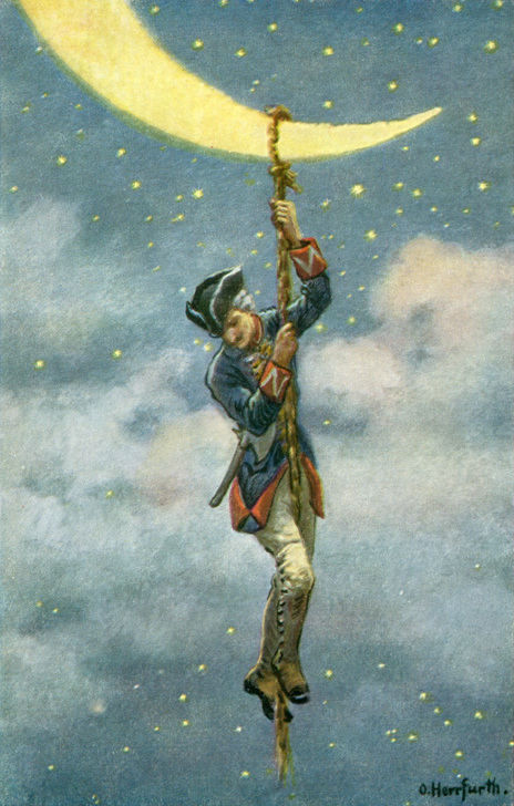 Münchhausens Abenteuer. Postkartenserie nach den Lügengeschichten des Baron Münchhausen. Serie der Firma UVACHROM (Verlag Farbenphotographische Gesellschaft m.b.H., Stuttgart) in zwei Folgen von je sechs Postkarten. Folge I: Serie 324. Nr. 4912–4917. Folge II: Unknown Text der Rückseite: Als Münchhausen in türkischer Kriegsgefangenschaft war, kam er einmal mit Bären in Kampf. Er schleuderte seine silberne Axt nach ihnen. Aber sie flog in die Höhe und fiel auf den Mond. Alsbald pflanzte er eine türkische Bohne, die rasch emporwuchs, bis sie sich an einem Horn des Mondes rankte. Münchhausen kletterte zum Mond und holte seine Axt. Da die Sonne aber die Bohne ausgetrocknet hatte, musste er beim Abrutschen immer wieder ein Stück abhauen und unten anknüpfen.